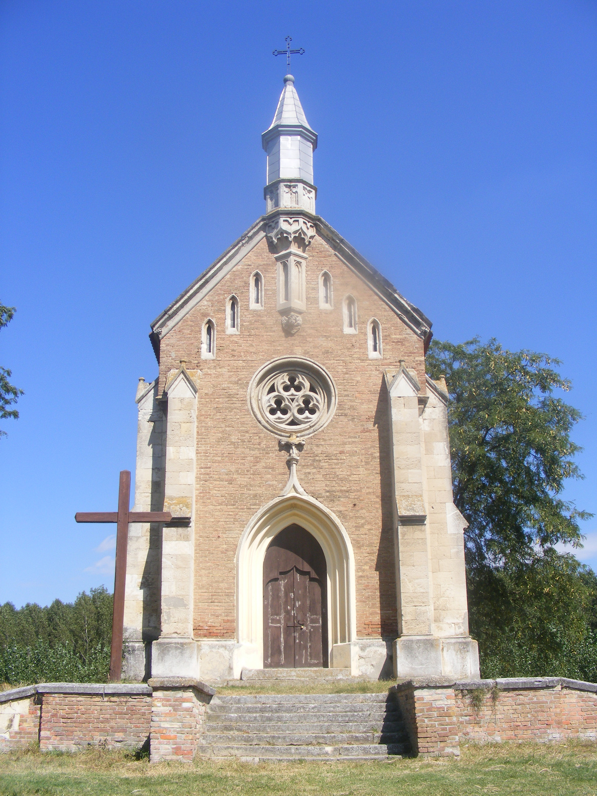 Zichy-emlékkápolna (római katolikus kápolna) (Lórév, külterület)